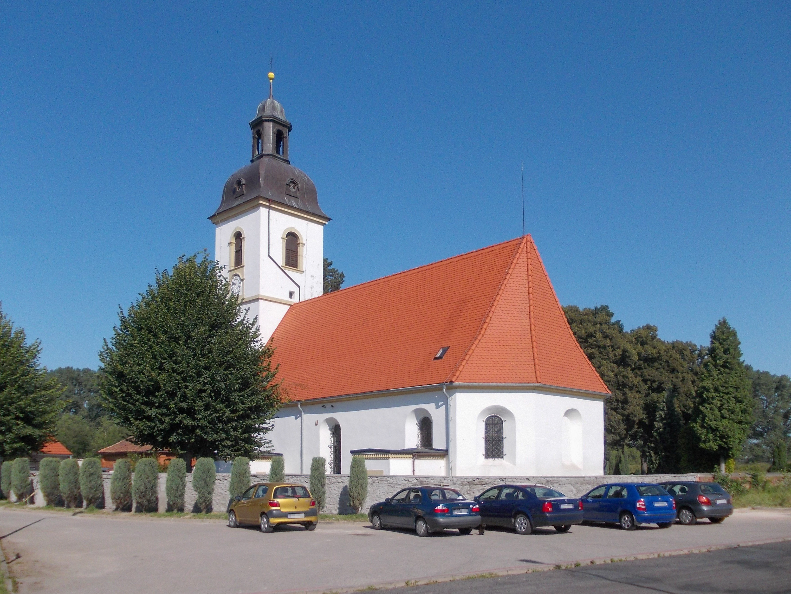 Kirche zur Unbefleckten Empfängnis in Sieniawka (Stadt Bogatynia)